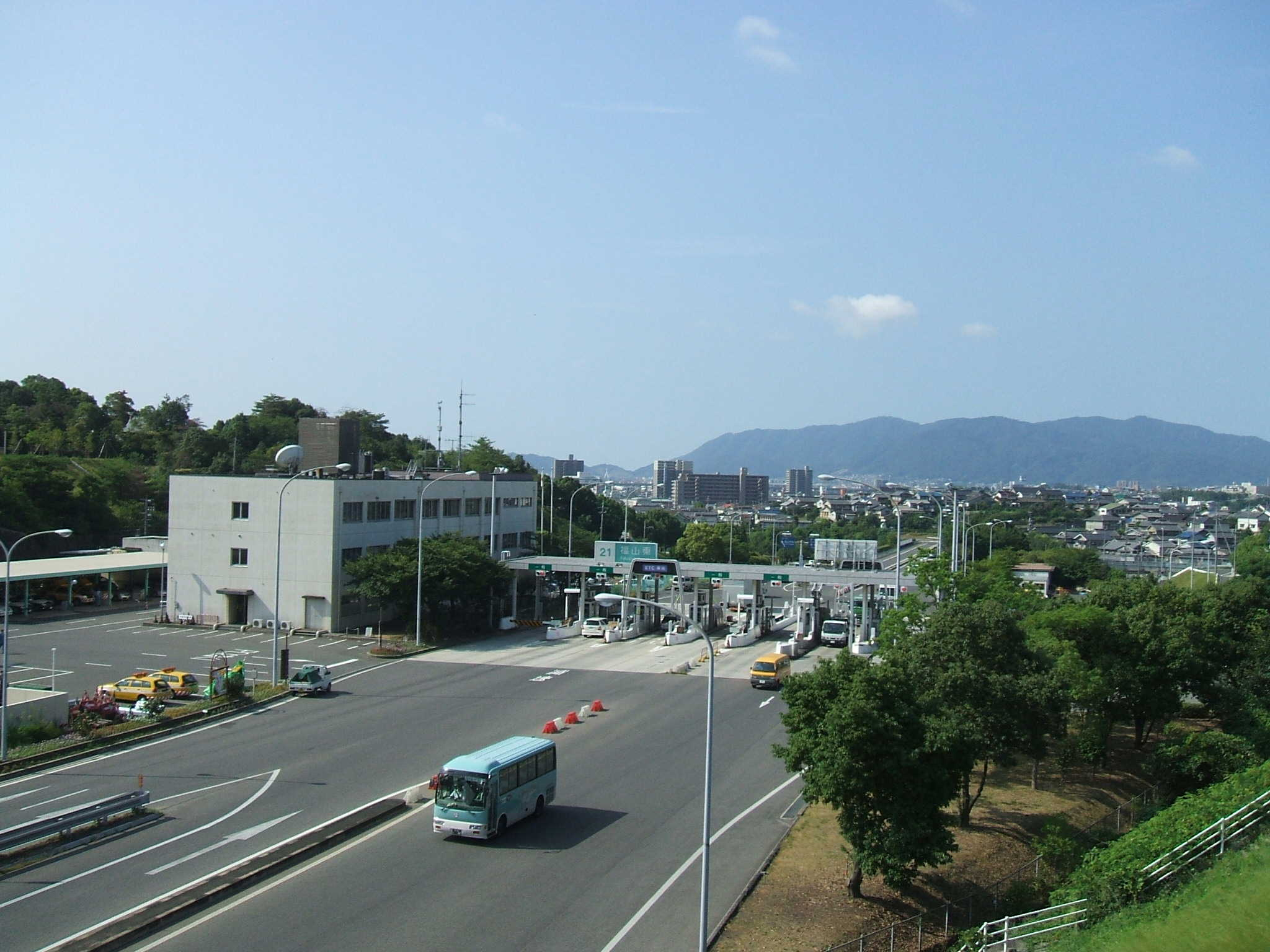 広島県福山市にある山陽自動車道福山東インターチェンジの料金所